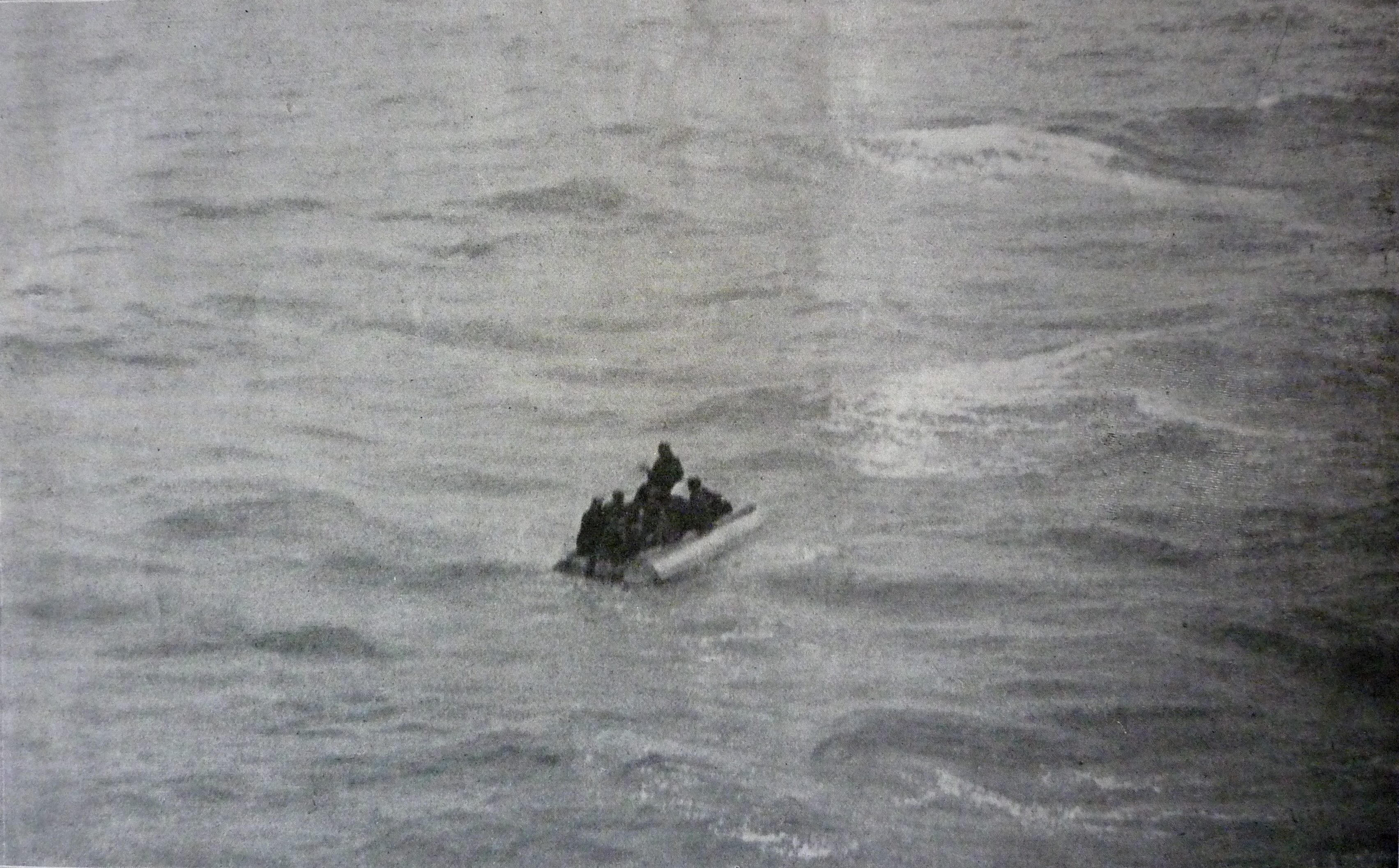 Radeau du paquebot Afrique avec 13 sénégalais recueillis par le paquebot Ceylan, un y décédera, photographie originale Jean Nugue, passager du Ceylan